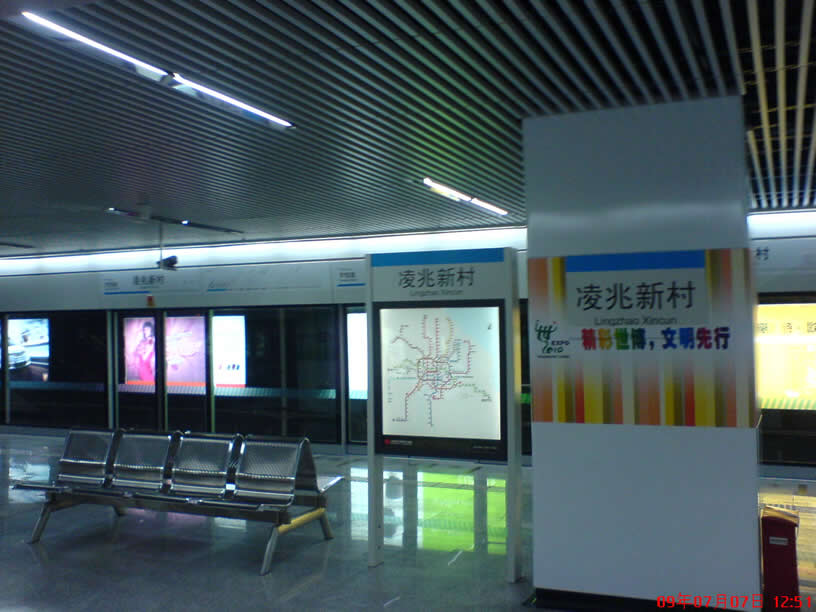 凌兆新村站站台